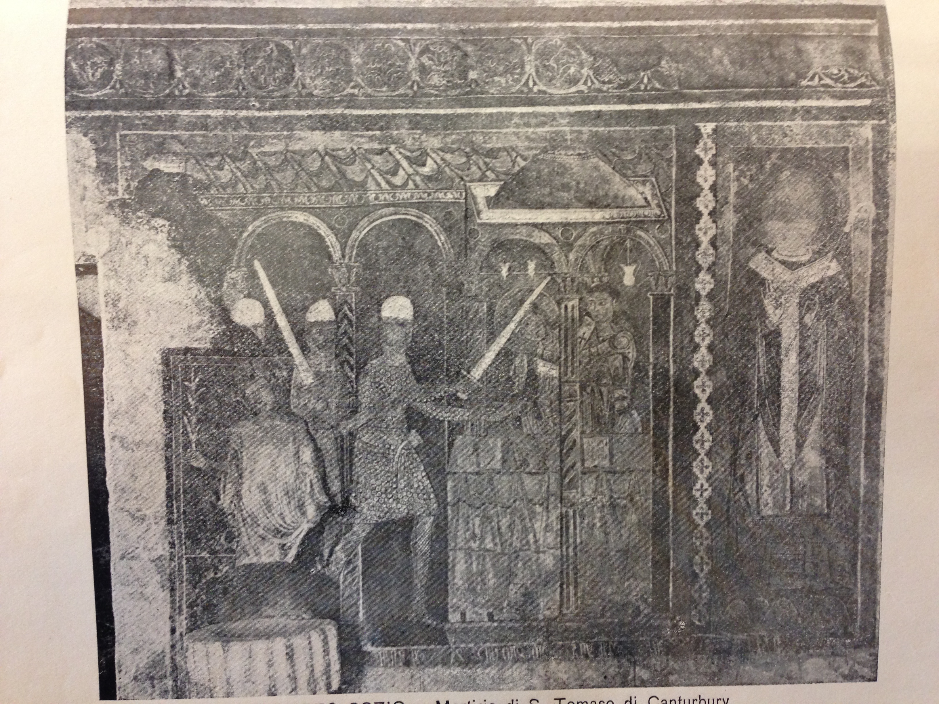 Martirio di Thomas Becket. Affresco nella ex chiesa dei santi Giovanni e Paolo. Spoleto. l'immagine è contenuta in Umberto Gnoli, Pittori e miniatori nell'Umbria Spoleto,1923, editore Claudio Argentieri